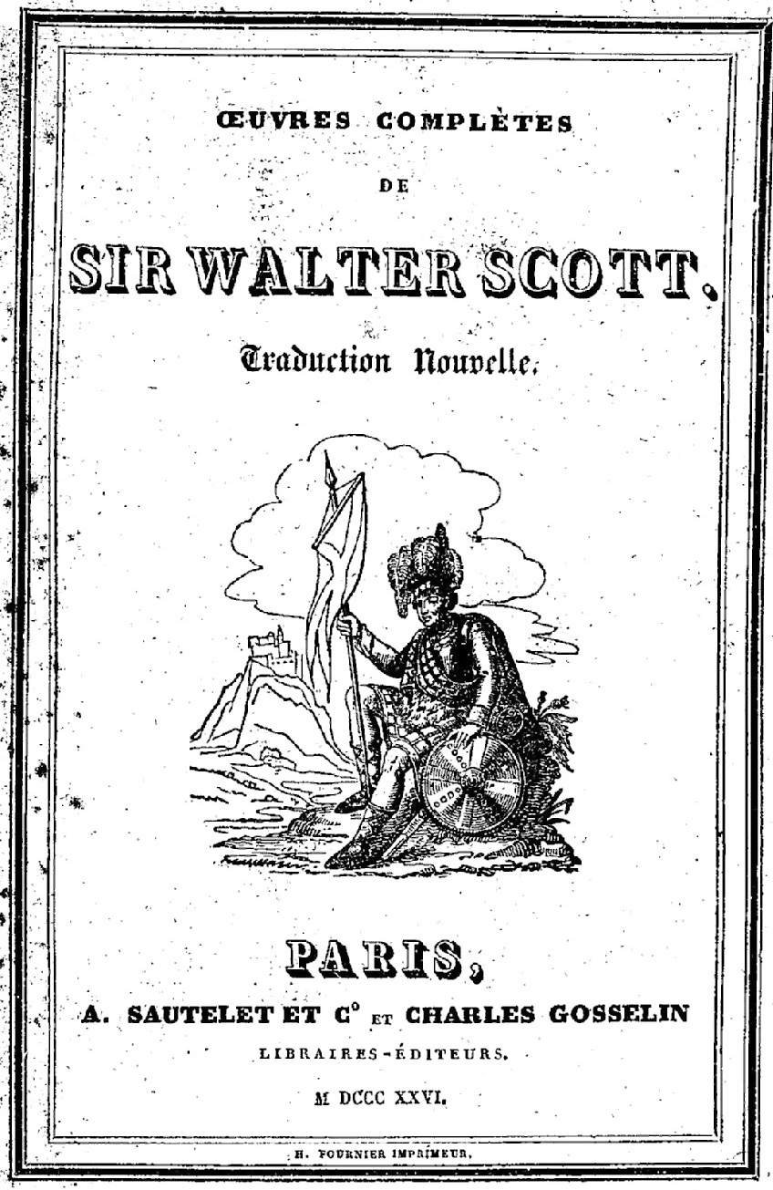 Couverture d'une traduction des Oeuvres complètes de Walter Scott à Paris en 1826